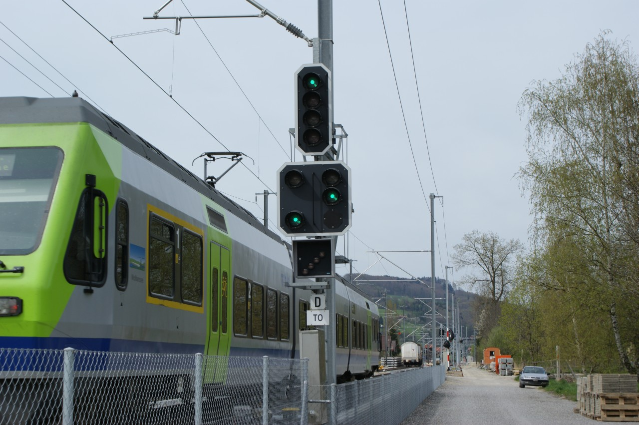 Einfahrsignal mit Ausfahrvorsignal Toffen von Kaufdorf her, NINA 014 passiert soeben das Signal, das Ein- und Ausfahrt offen zeigt.